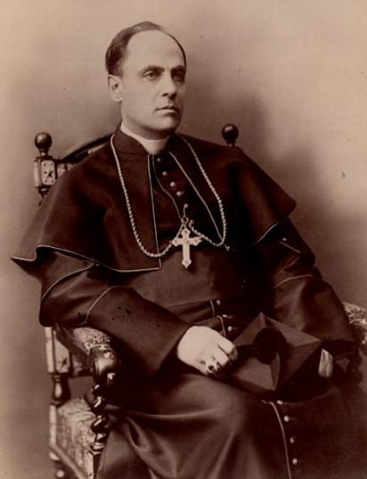 André-Albert Blais (1842-1919)